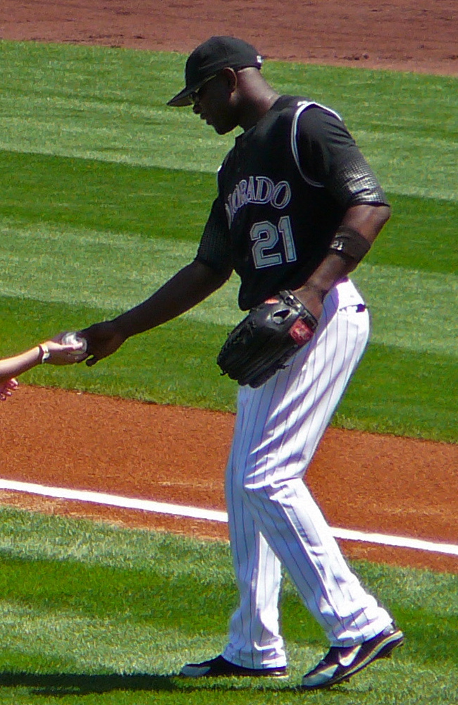 Choo Freeman